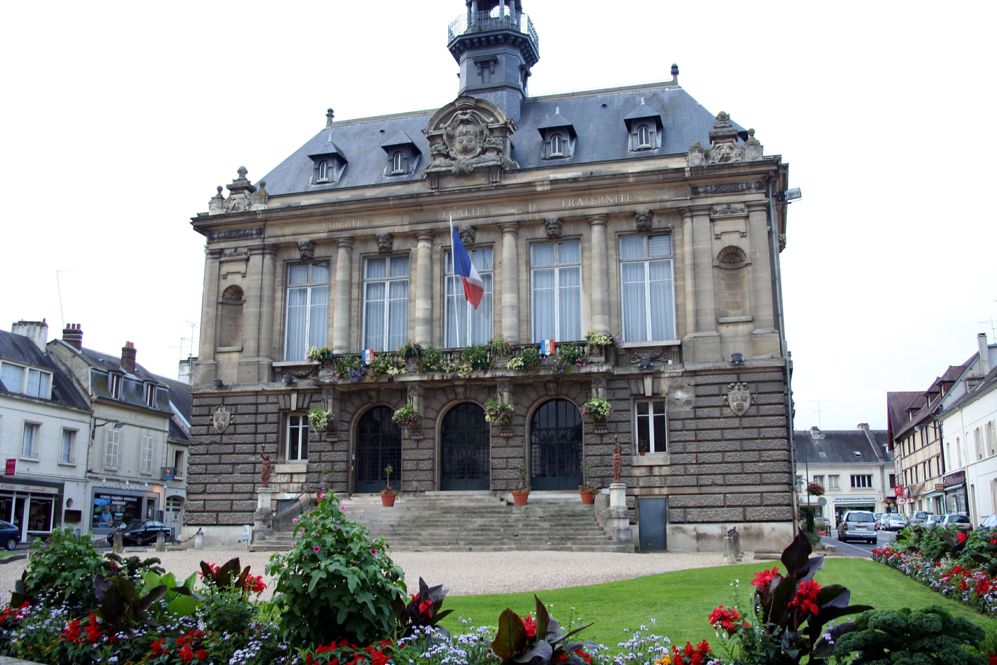 Hôtel de ville de Vernon, Eure (France)